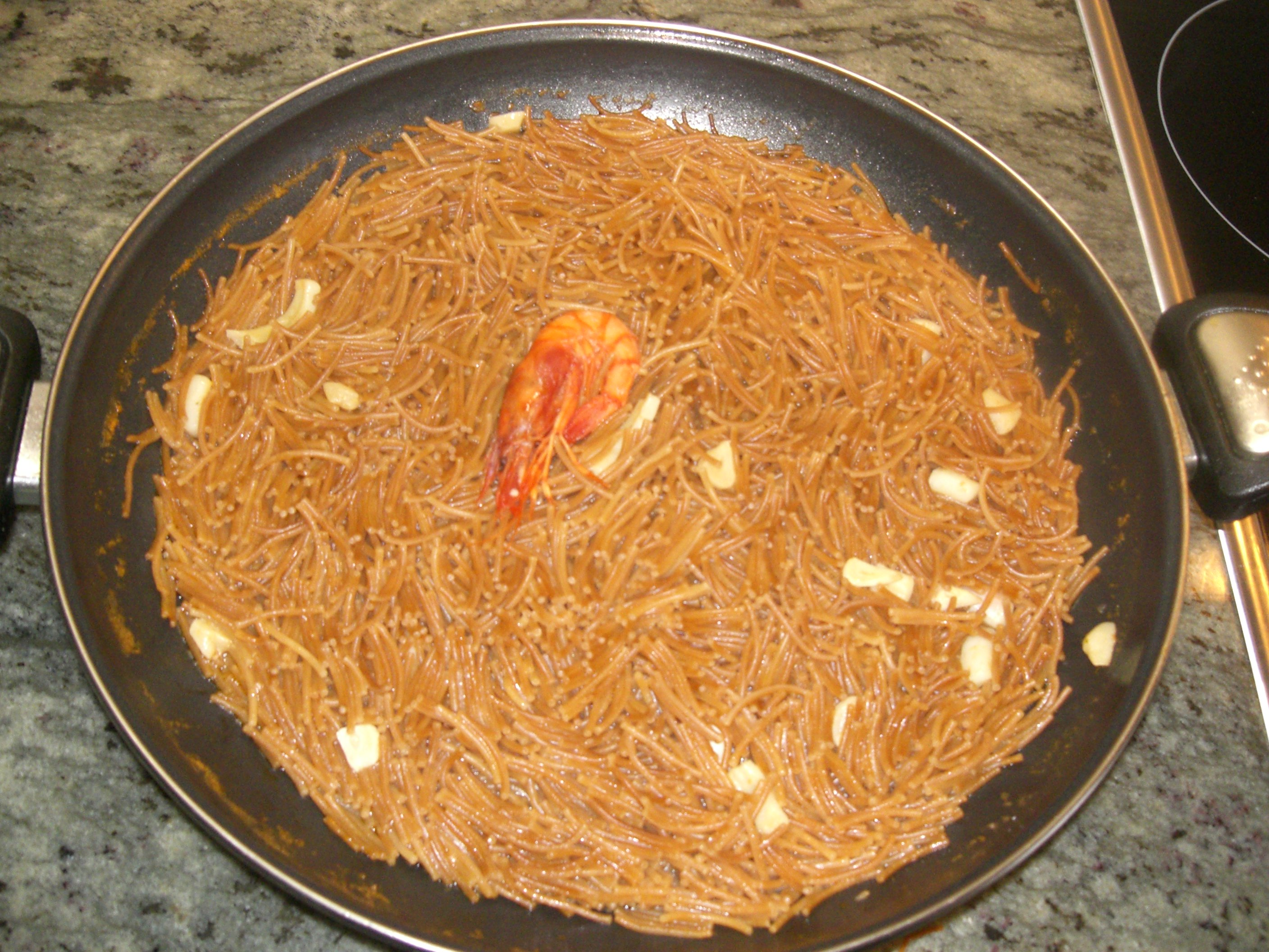 Foto de una Fideuà